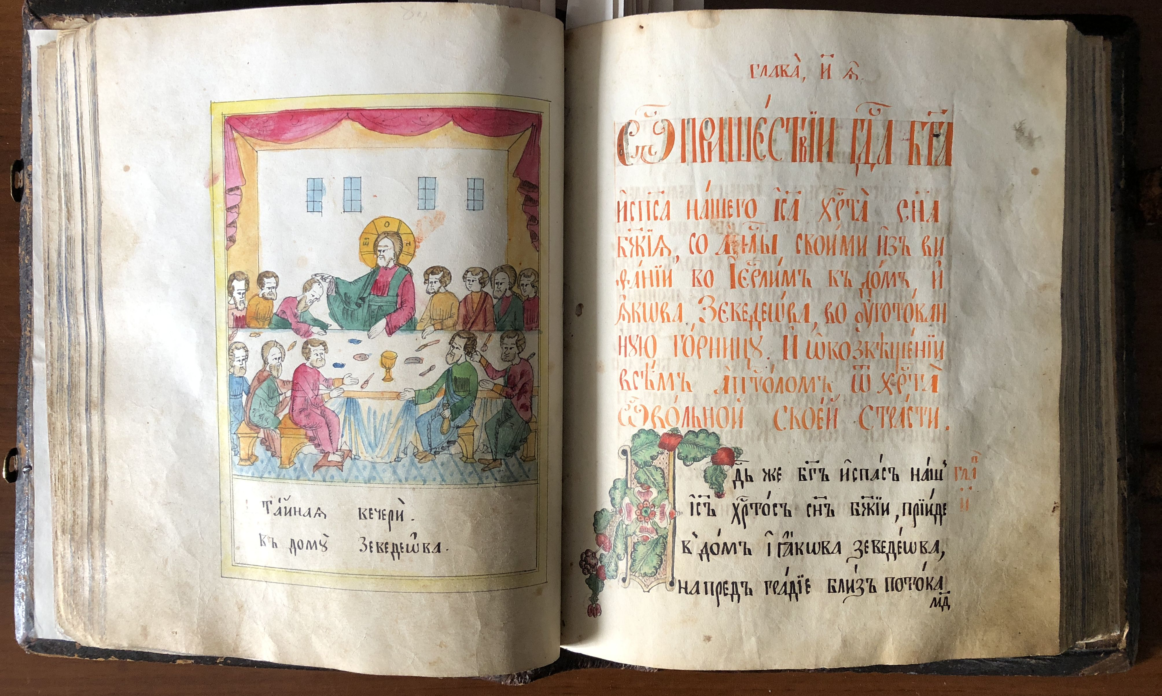 "Страсти Христовы", глава 8, миниатюра с Тайной вечерью (старообрядческая рукопись, 1860-е гг.; частное собрание)